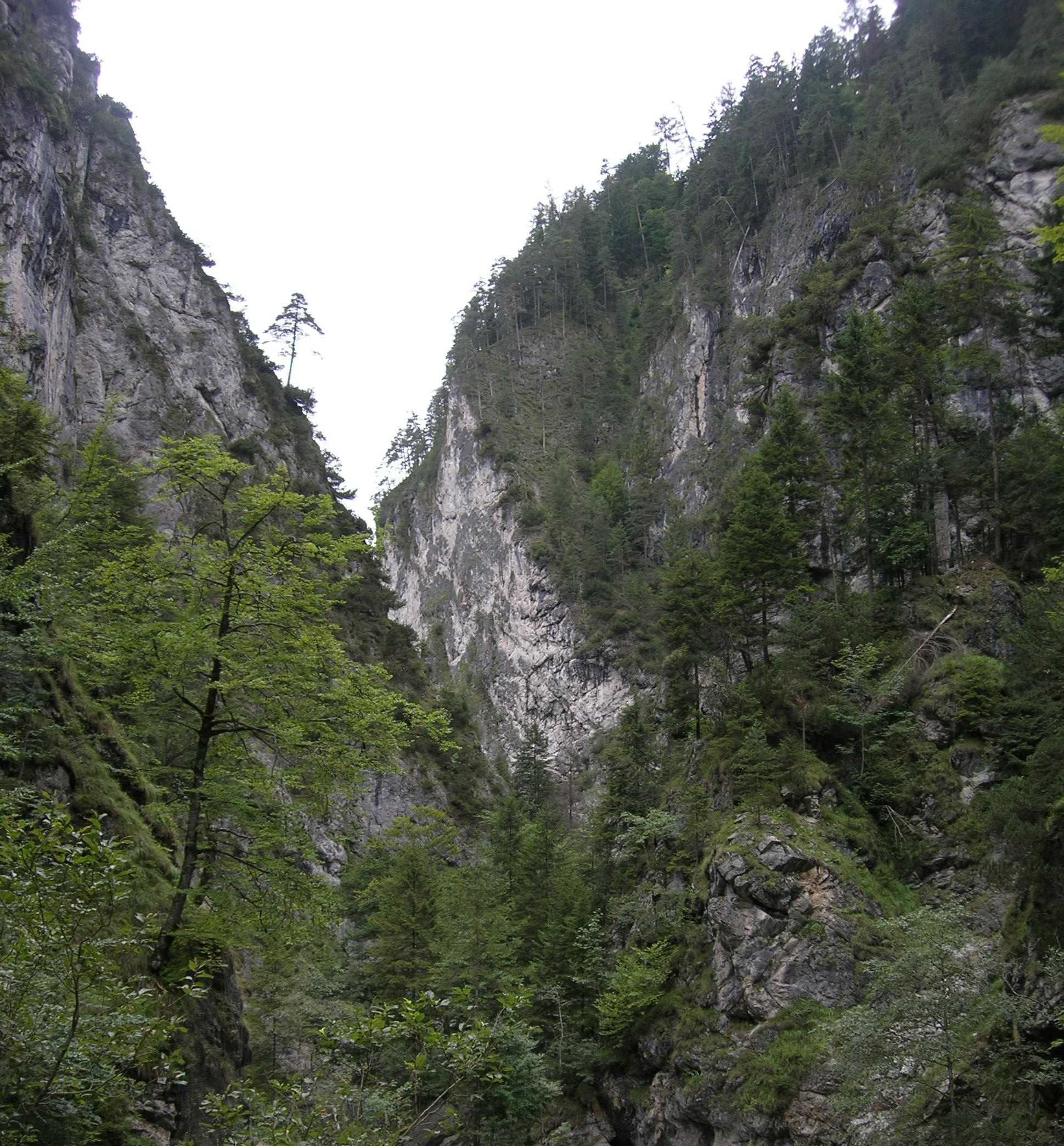 Bild der Kundler Klamm in der Wildschönau